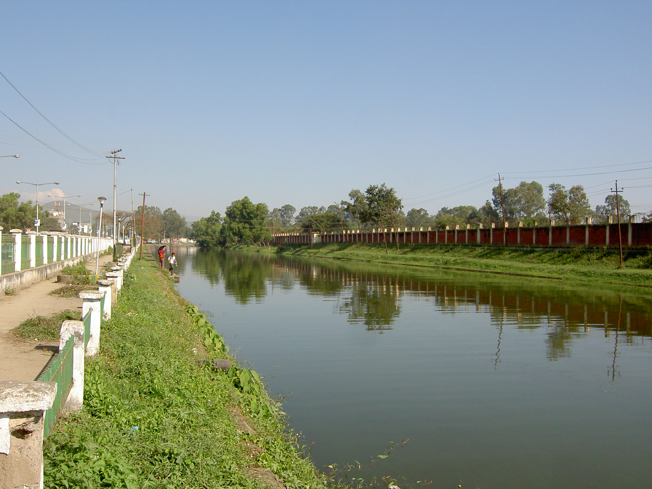 Kangla Gate - Imphal - Manipur